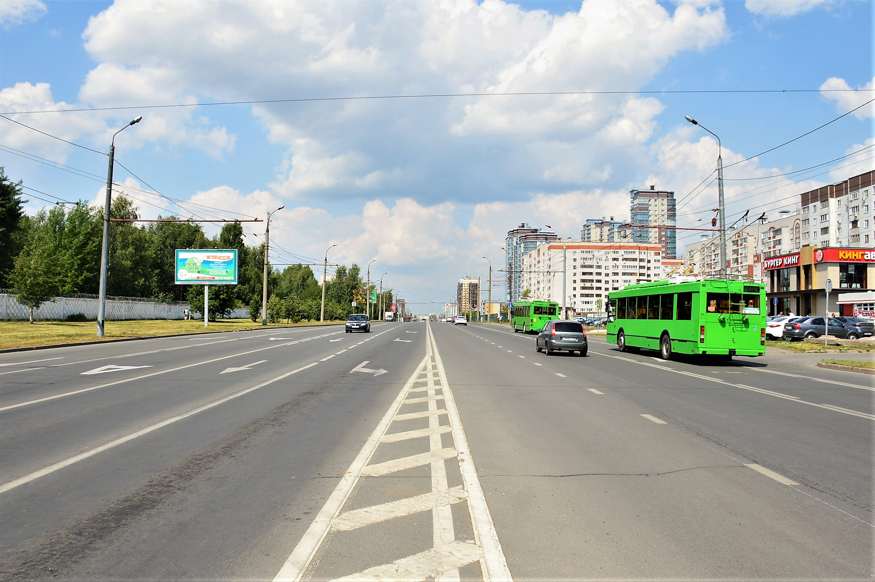 Казань. Улица Юлиуса Фучика: вид в сторону Азино